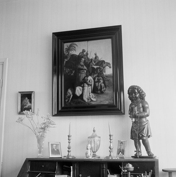 Gemonogrammeerd en gedateerd rechtsonder: RHL [Rembrandt Harmenszoon Leidensis] 1626.